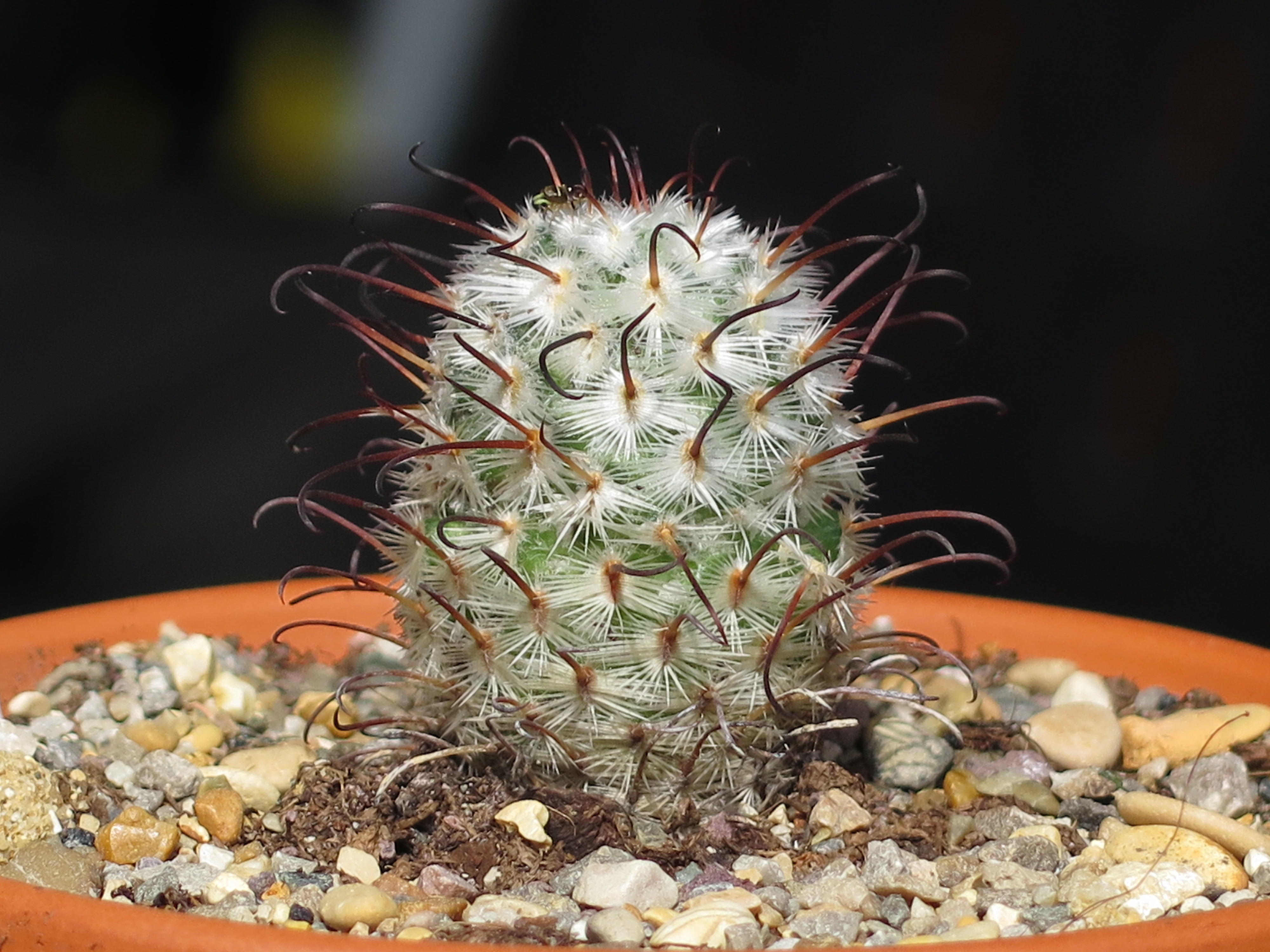 Mammillaria perezdelarosae (Syn: Mammillaria bombycina ssp. perezdelarosae)